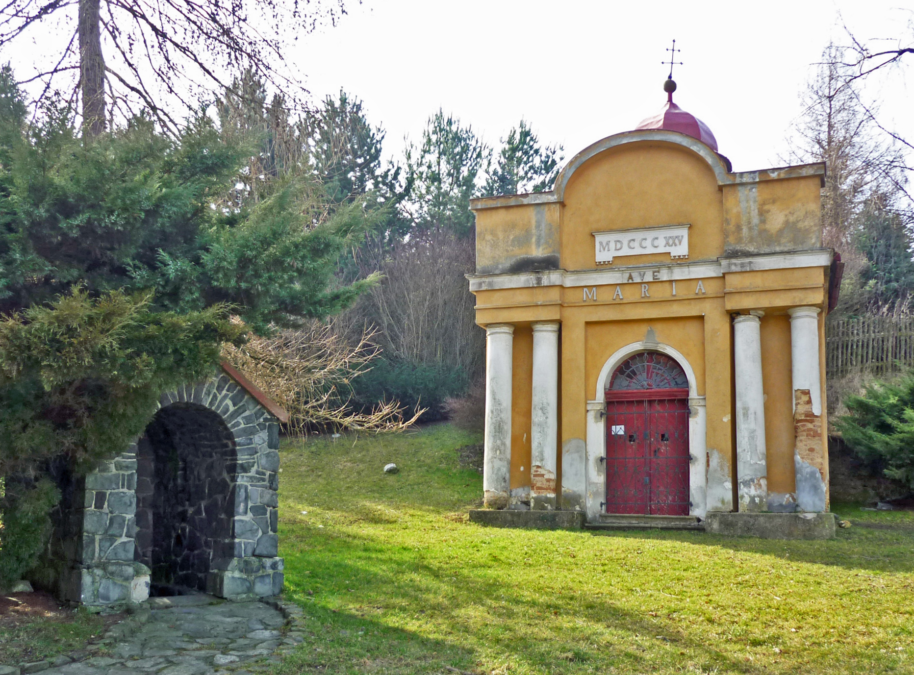 Marienkapelle in Kostenblatt (Kostomlaty pod Milešovkou) im Böhmischen Mittelgebirge